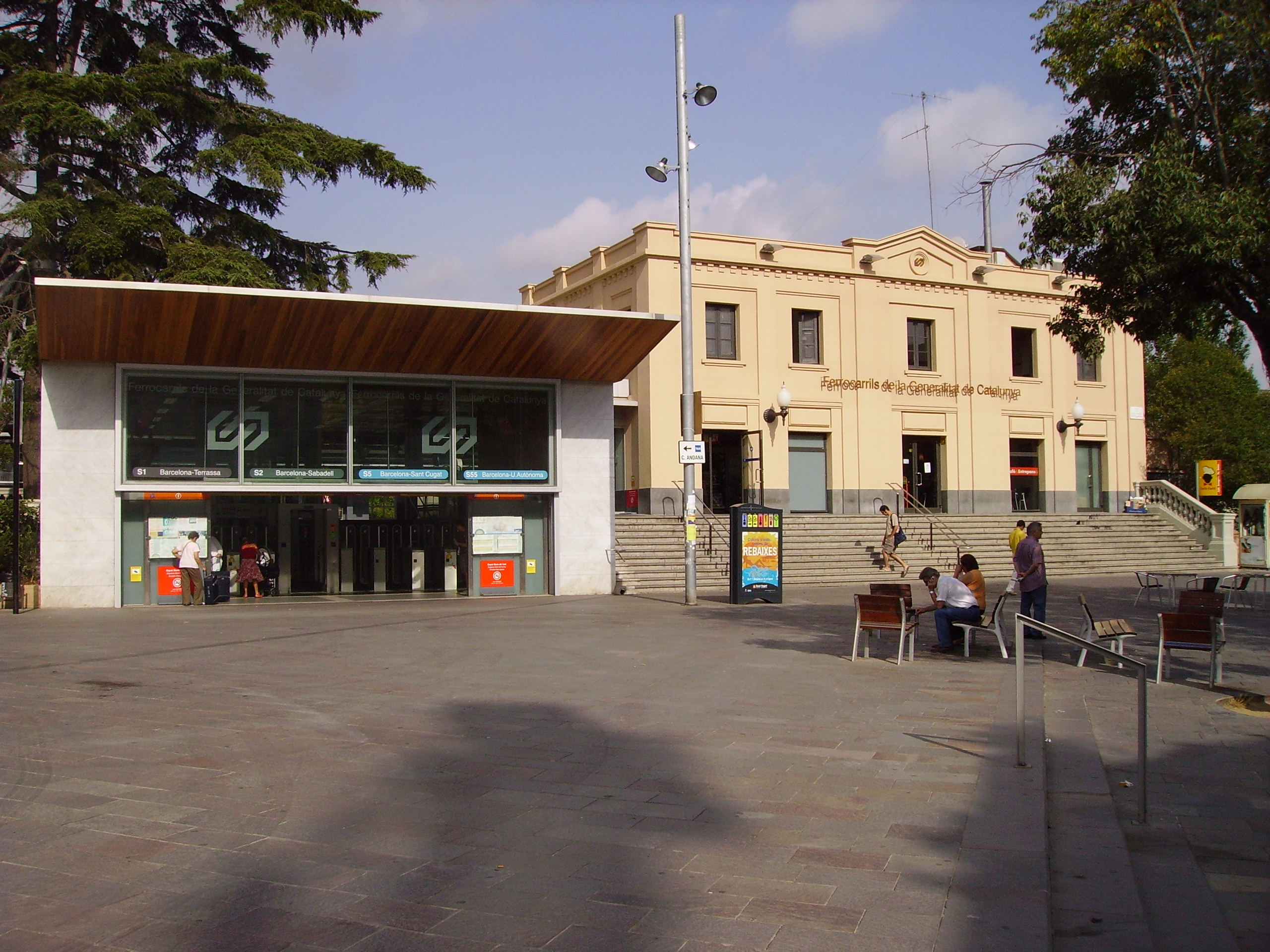 Estació dels FGC a Sant Cugat del Vallès, Vallès Occidental, Catalunya.